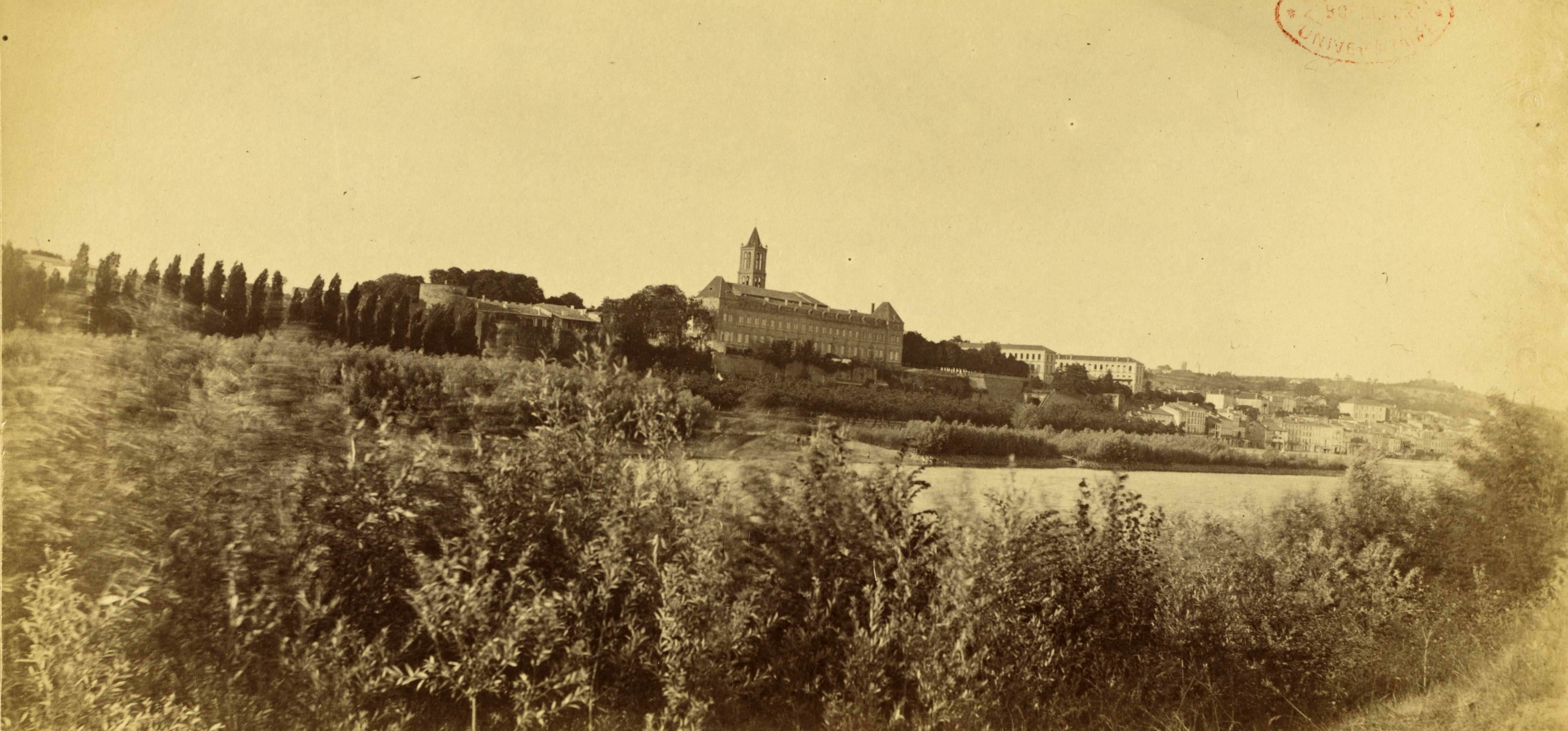 La Réole photo de J-A Brutails